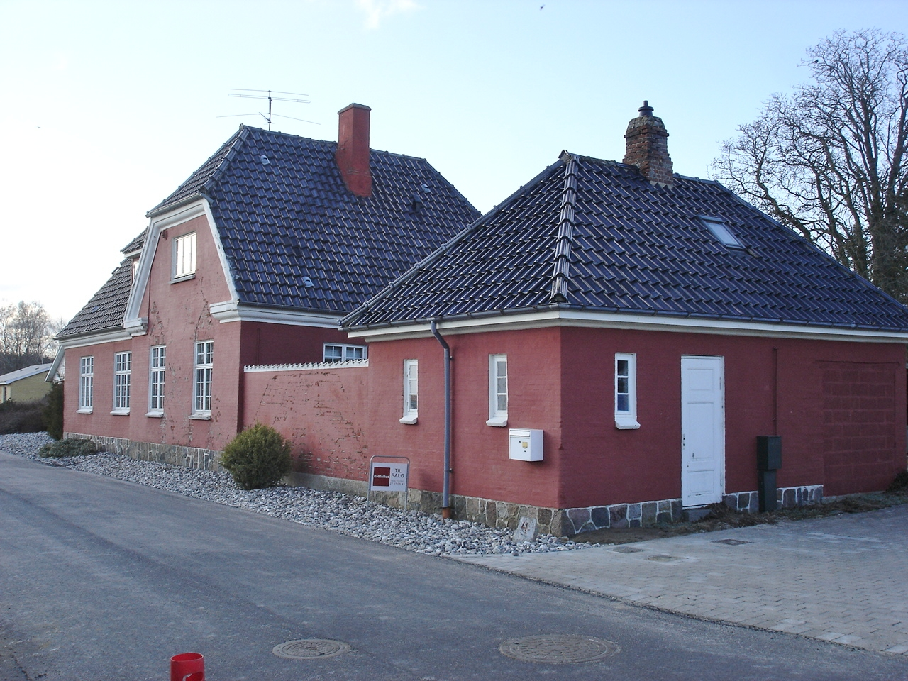 Harndrup Station, vejsiden fra SØ